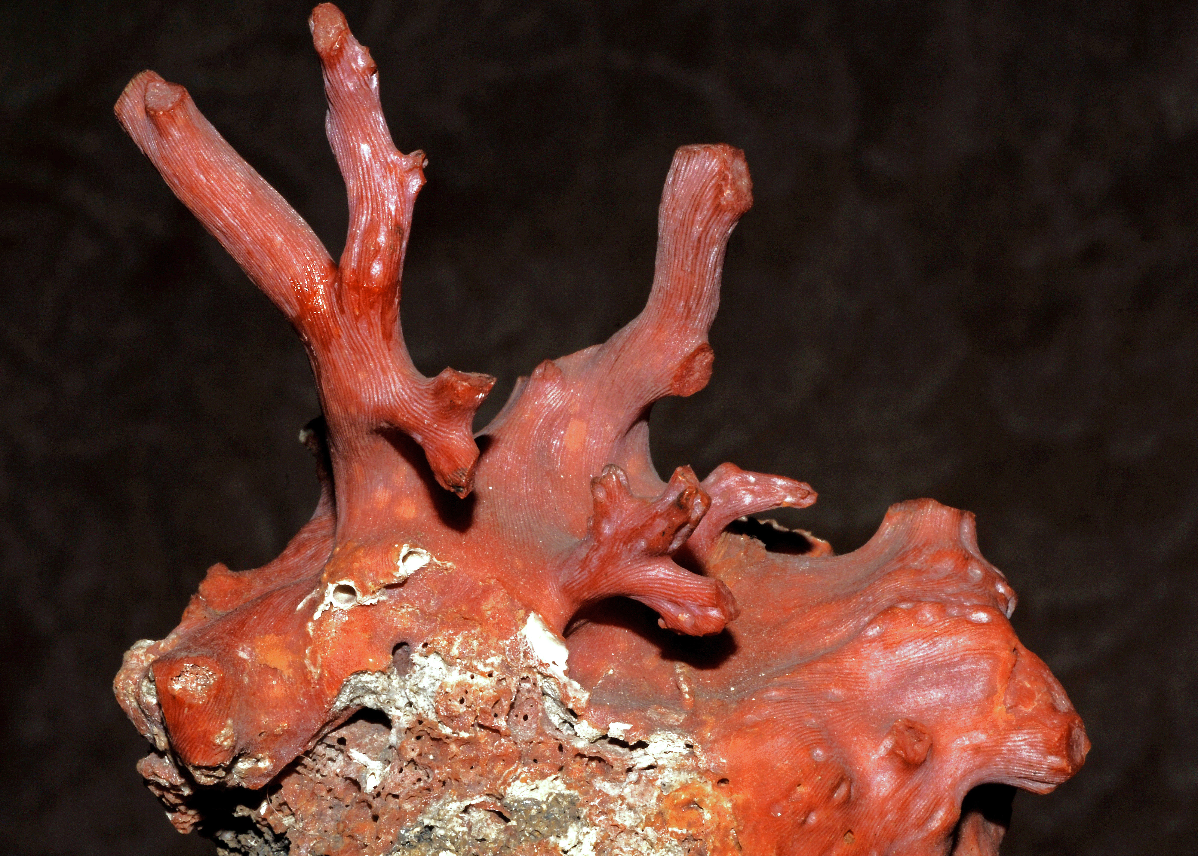 Corallium rubrum (Linnaeus, 1758)